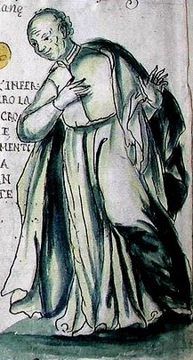 Ritratto miniato di don Michelangelo Falanga